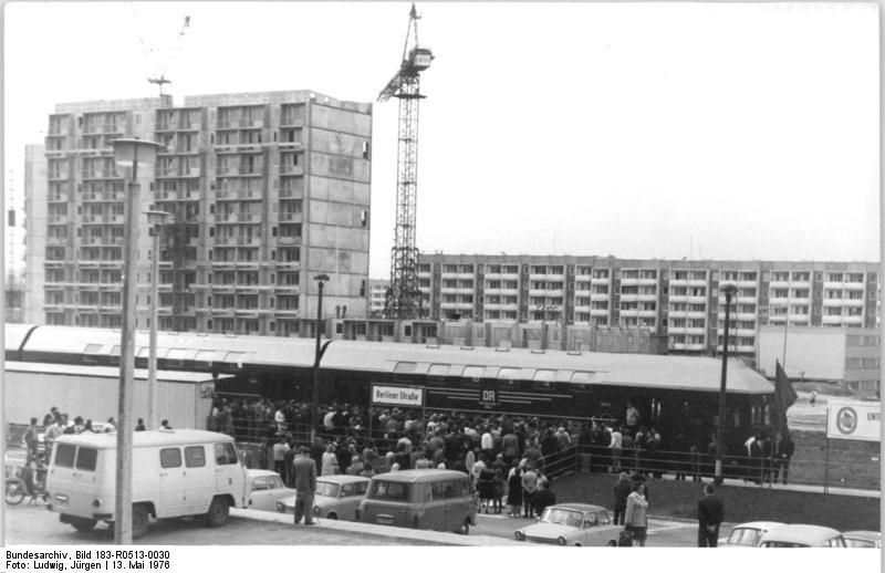 Erfurt, Neubauviertel Nordhäuser Straße, Bahnhof ADN-ZB Ludwig-13.5.76 Erfurt: DDR - aktuell- In der Bezirksstadt Erfurt hat die Deutsche Reichsbahn am 13.5.76 den öffentlichen Nahverkehr im Neubauviertel Nordhäuser Straße aufgenommen. In nur 13 Minuten befördern künftig die bequemen Wendezüge die Erfurter vom nördlichen Stadtrand zum Hauptbahnhof im Zentrum. 13 mal täglich, insbesondere zu den Spitzenzeiten des Berufsverkehrs, fährt dieser "Express", dessen ausgebauter Schienenstrang einschließlich zweier neuer Bahnhöfe in nur drei Monaten Bauzeit entstand.